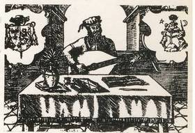 Valentin Greff Bakfark auf dem Titelblatt der 1553 in Lyon gedruckten "Intabulatura" (Ausschnitt)